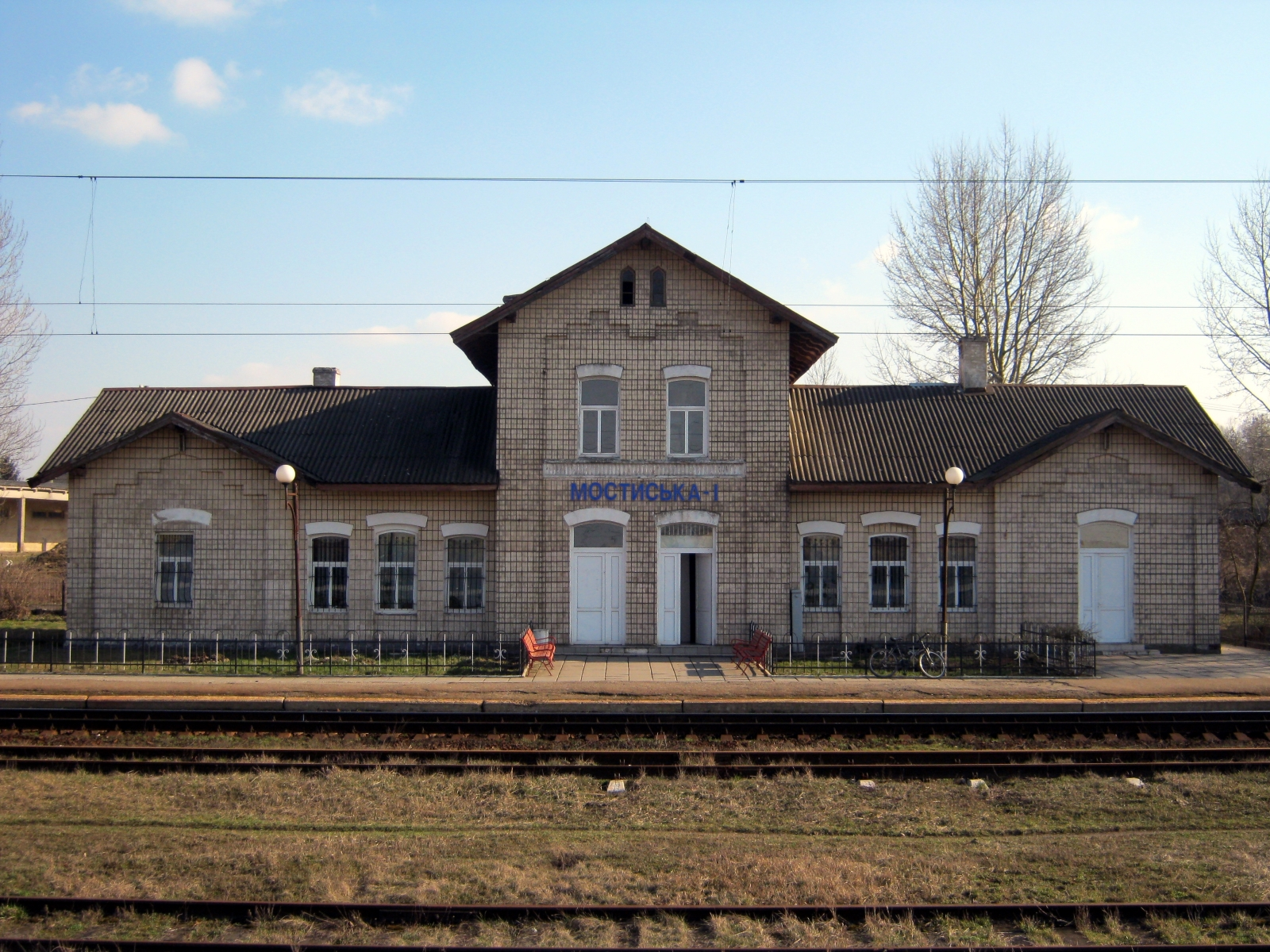 Будівля залізничного вокзалу в Мостиськах